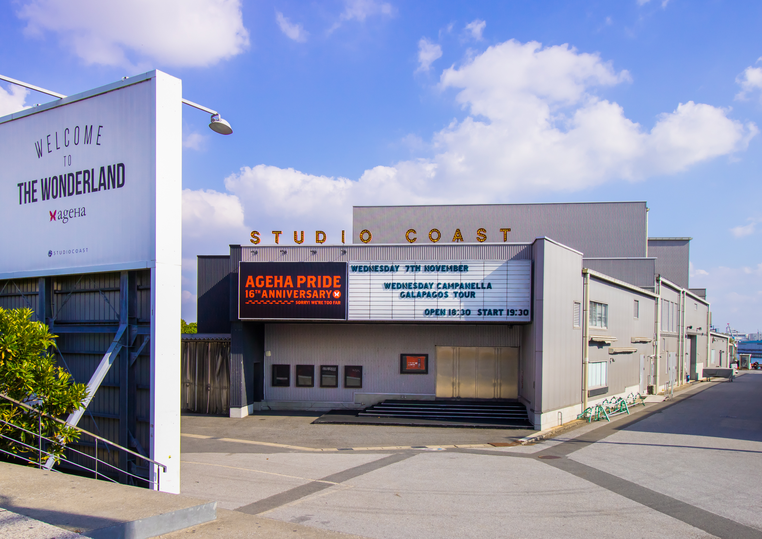 STUDIO COAST (ageha)。東京都江東区木場。